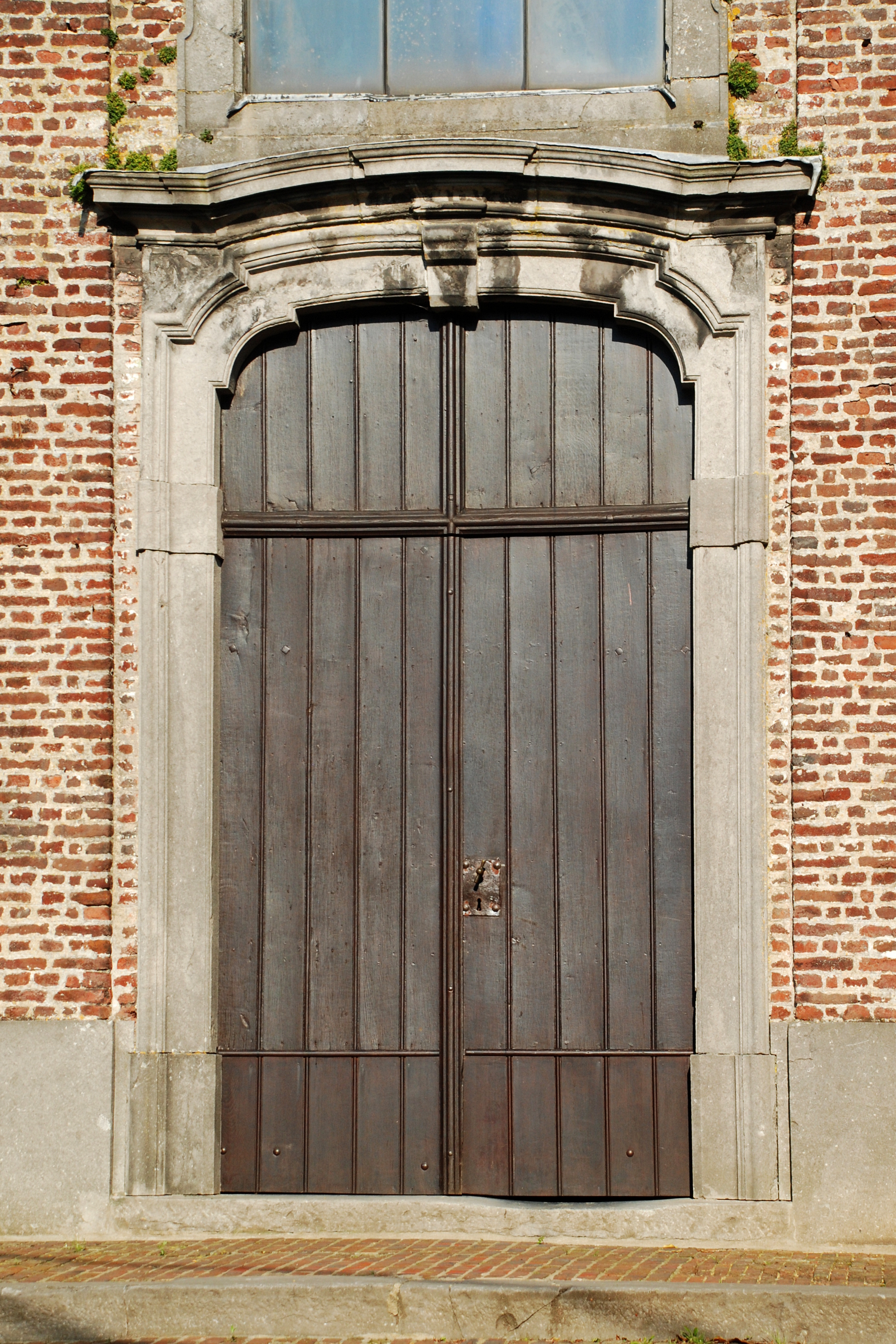 Belgique - Brabant wallon - Église Saint-Pierre de Glabais